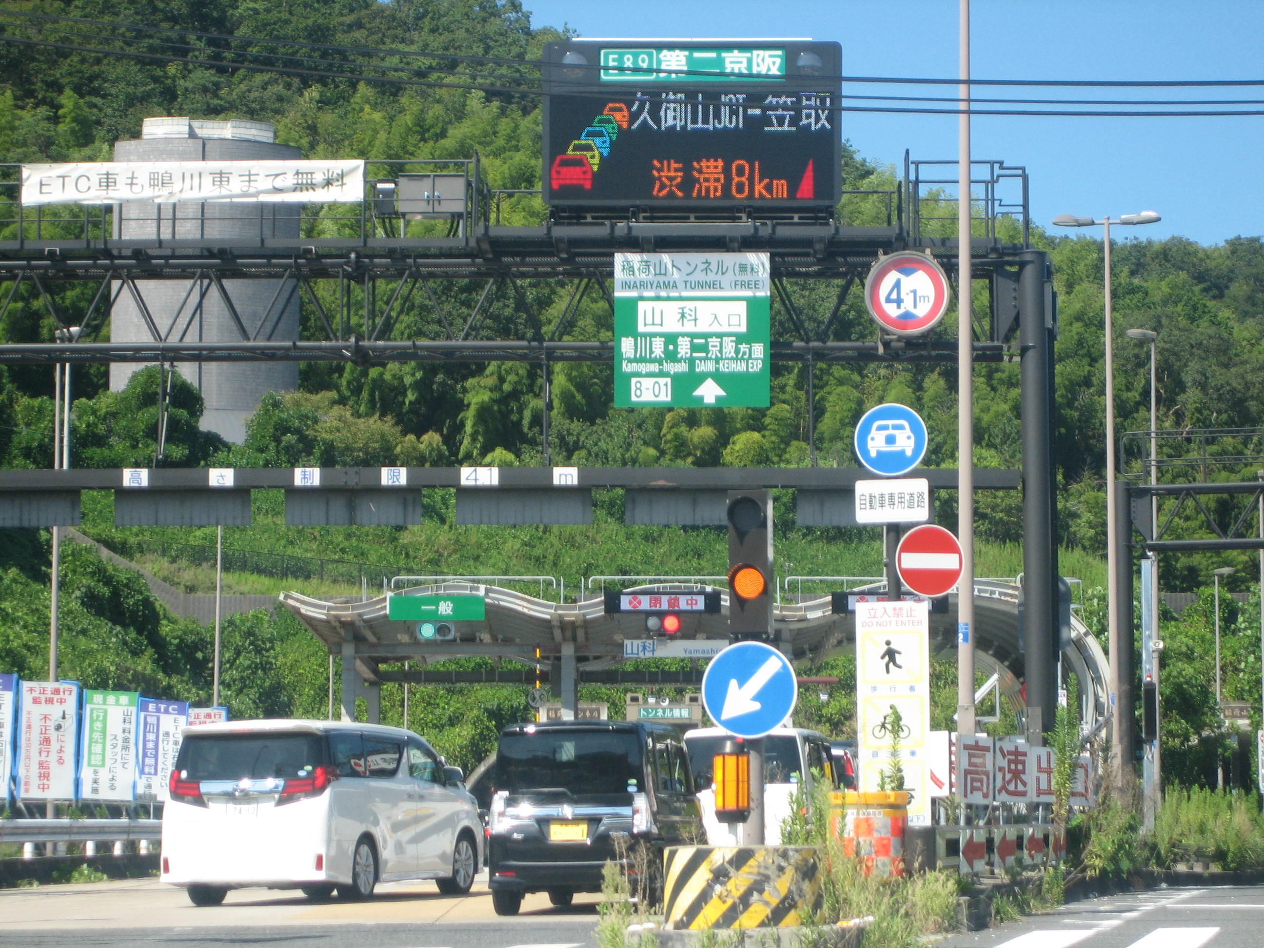 山科出入口